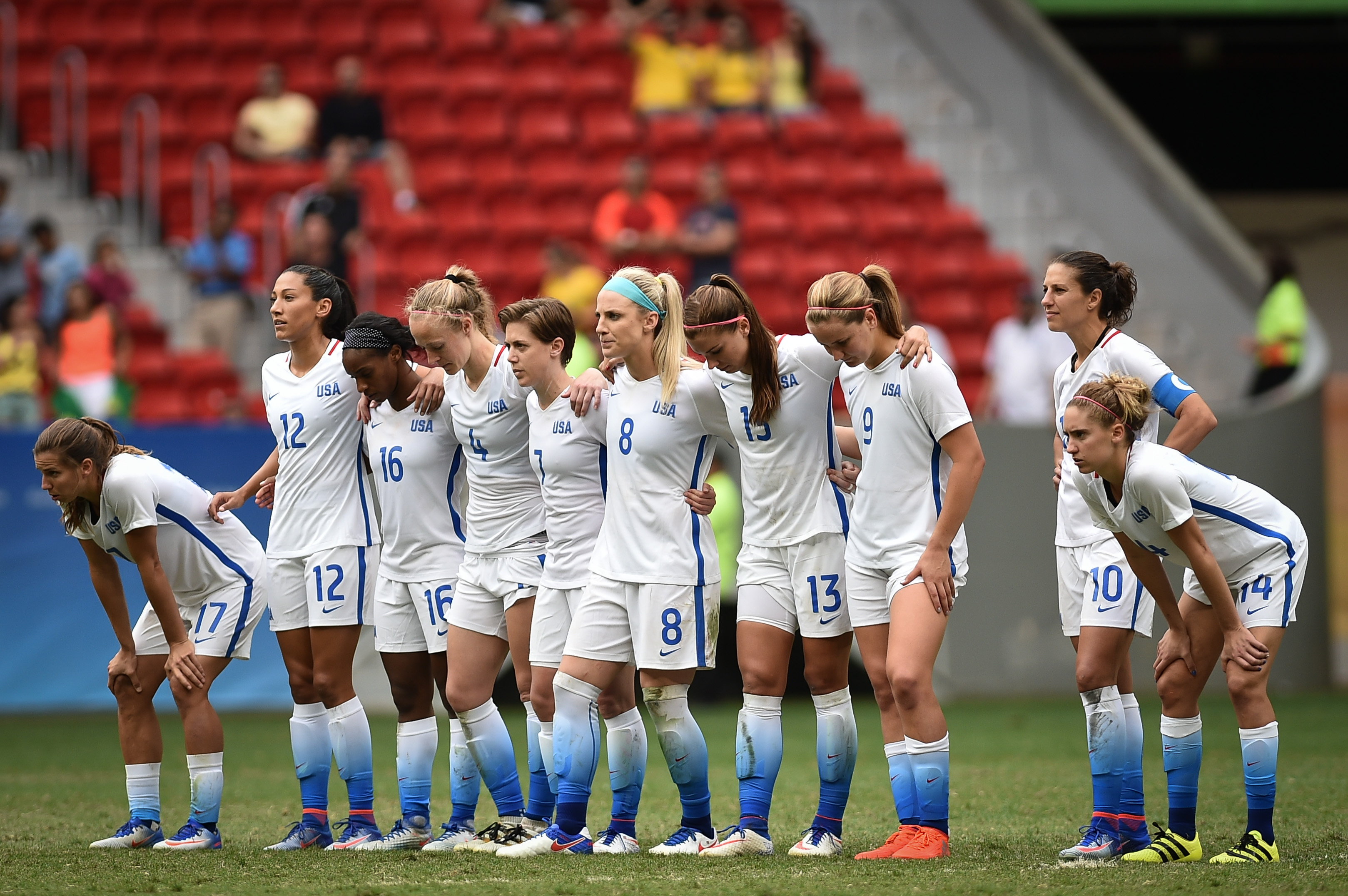 Estádio Nacional de Brasília Mané Garrincha, Brasília, DF, Brasil, 12/8/2016 Foto: Andre Borges/Agência Brasília. Estados Unidos e Suécia jogam nesta sexta-feira (12), no Estádio Mané Garrincha, pelas quartas de final do futebol feminino na Olimpíada 2016.